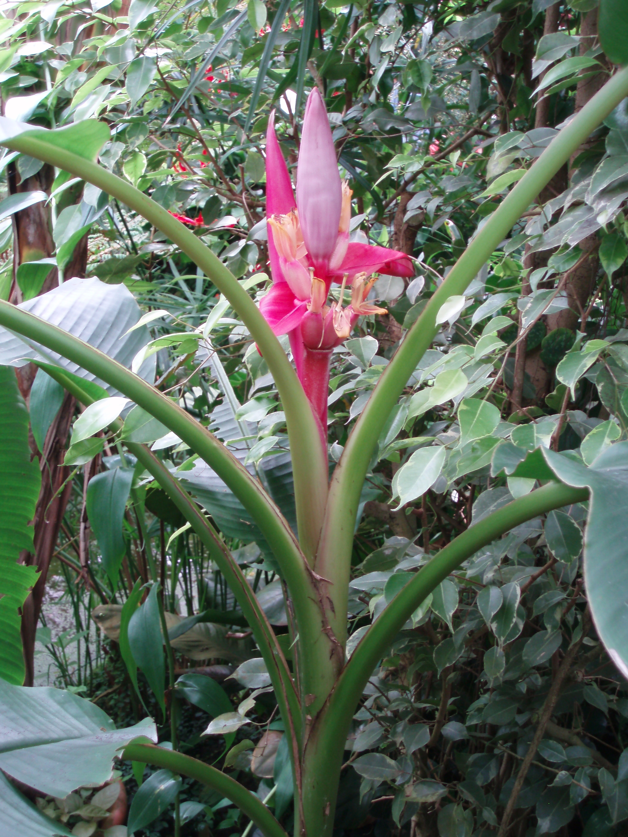 Musa velutina, inflorescence